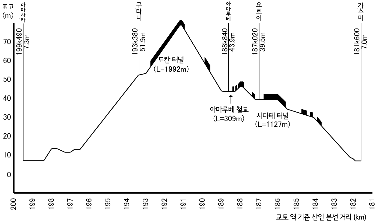 File:JR Sanin line Kasumi-Hamasaka longitudinal map.png의 한국어 번역판